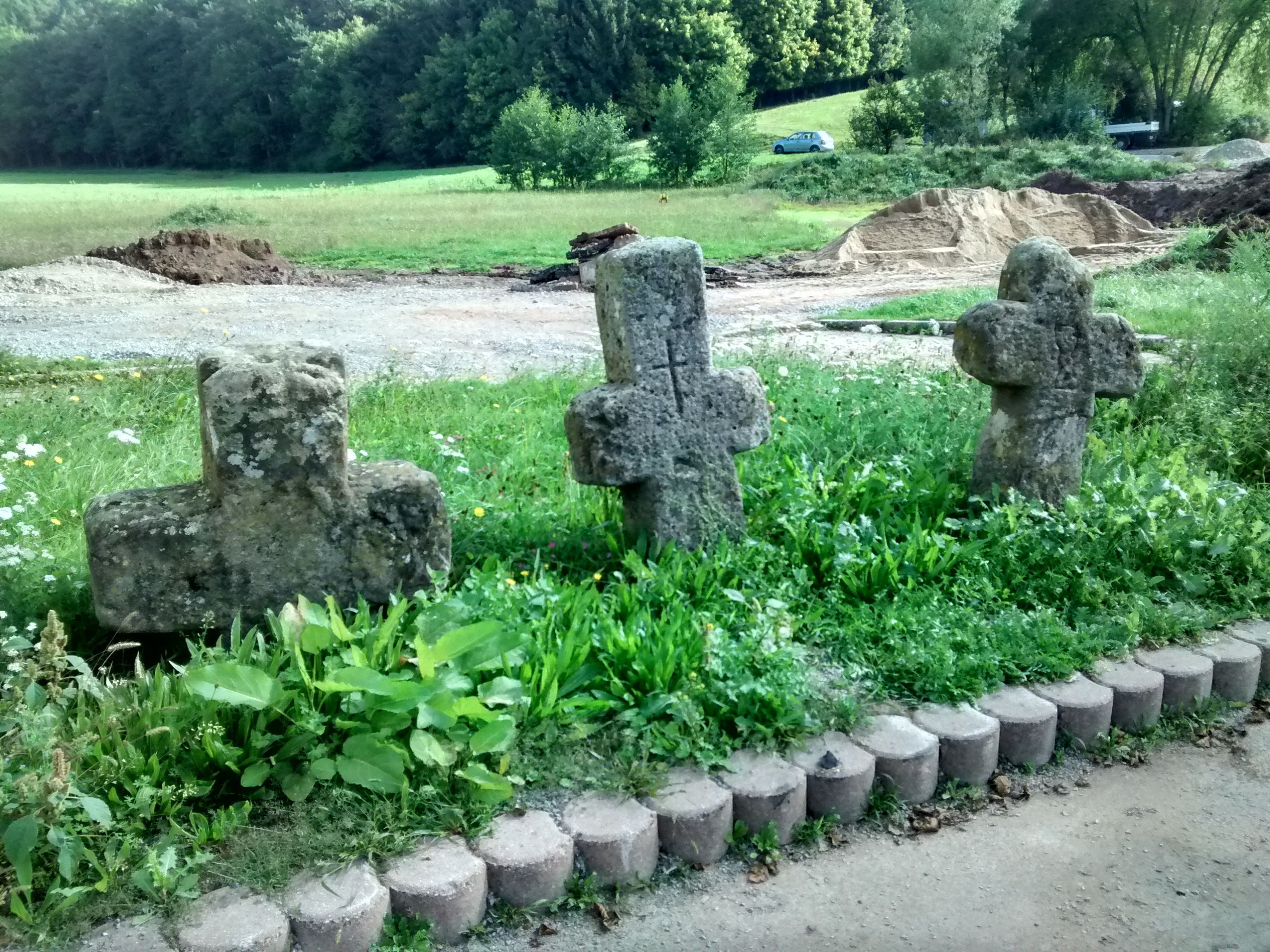 Denkmalgeschütztes Steinkreuz bei Neuschauerberg, Ortsteil von Emskirchen This is a photograph of an architectural monument.